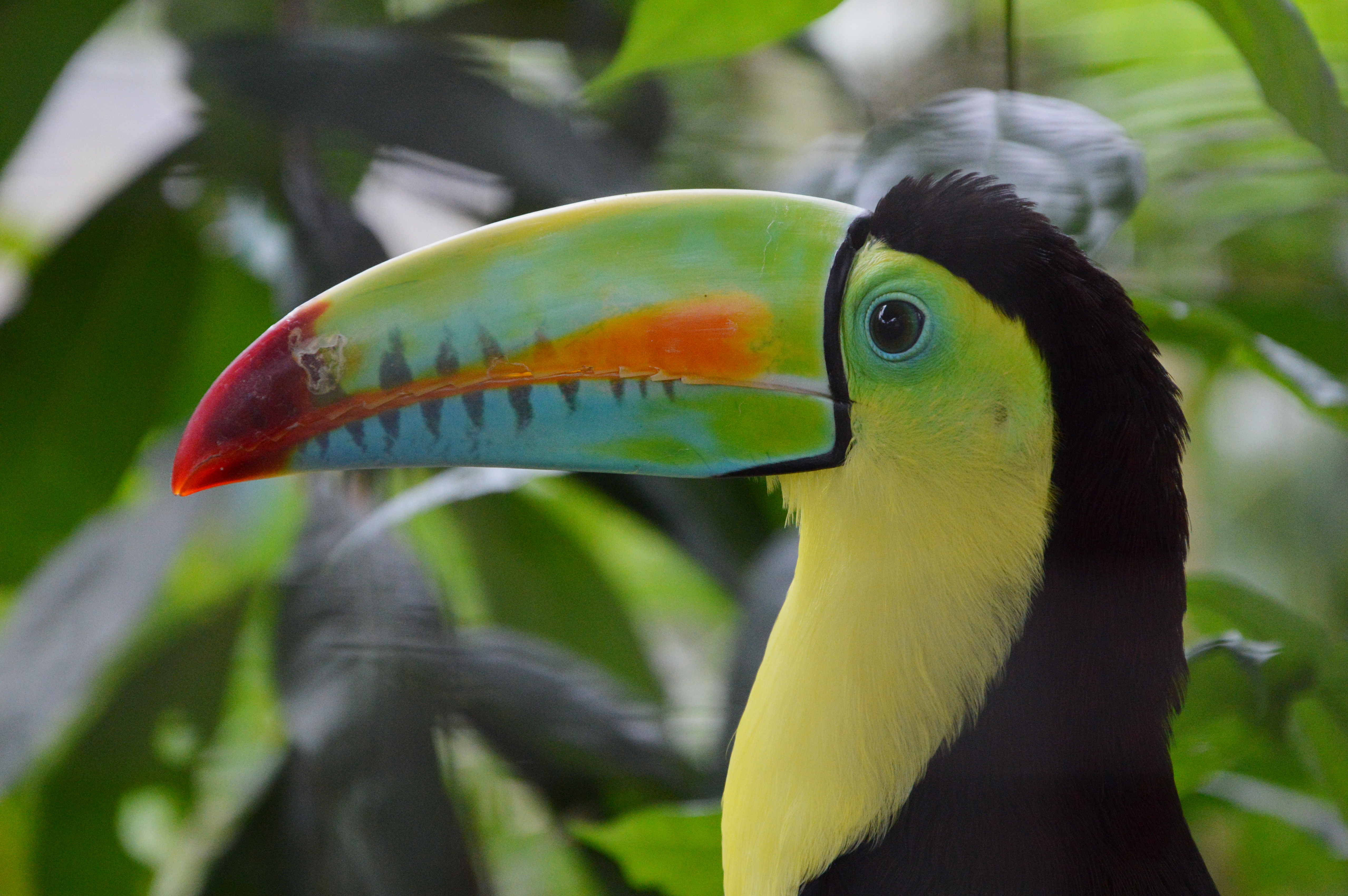 Vääveltuukan. Summiti munitsipaalpark, Panama.